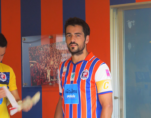 David Rochela